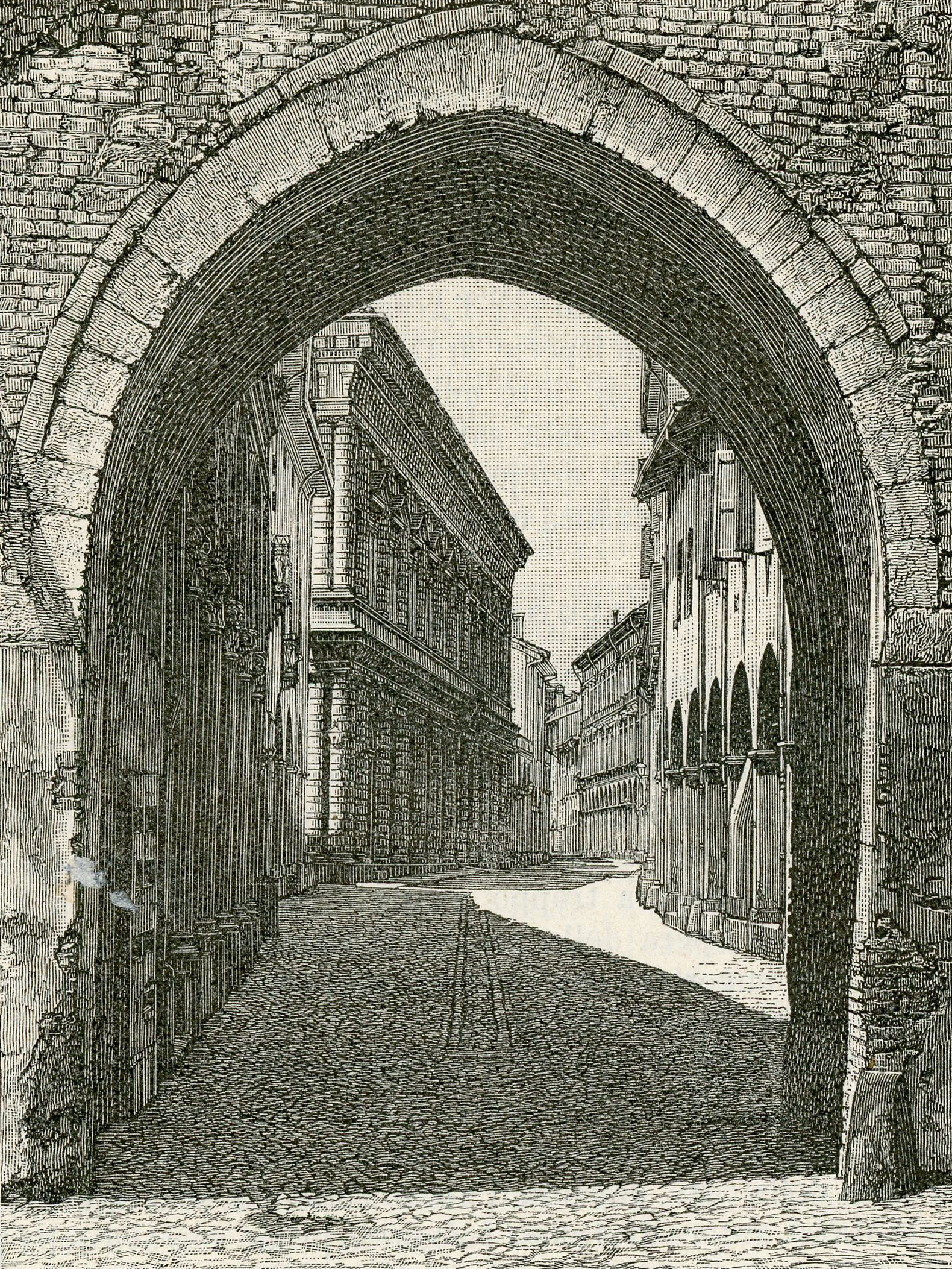 Bologna: Porta e strada di San Vitale (xilografia).